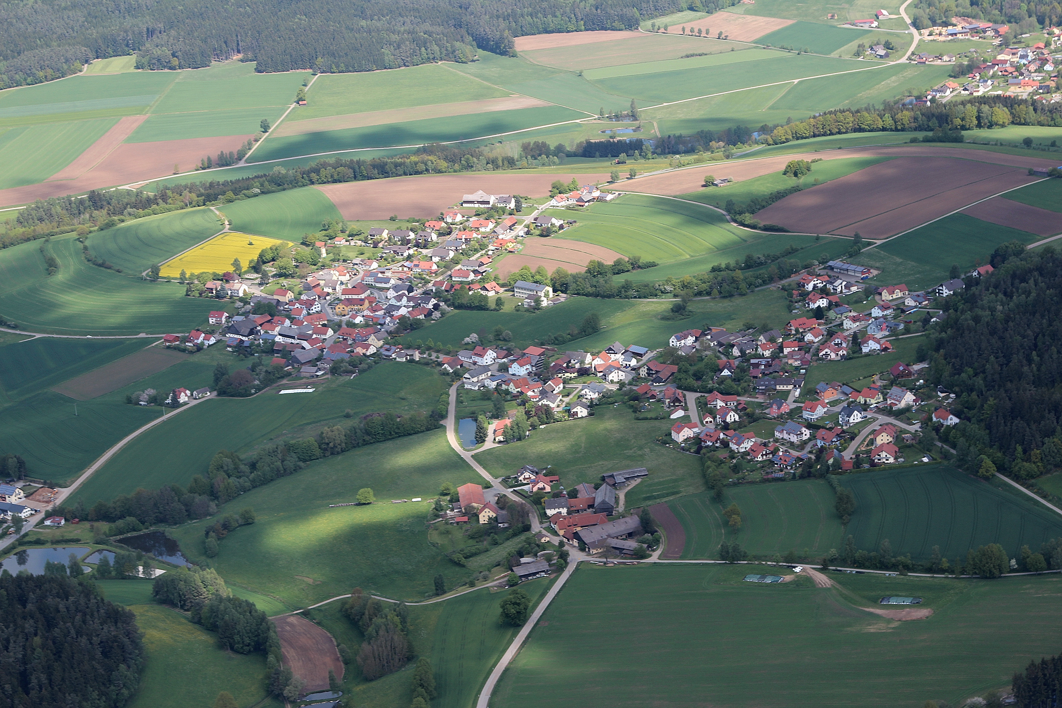 Gleiritsch, Bildmitte unten Steinach, rechts oben ein Teil von Lampenricht; Landkreis Schwandorf, Oberpfalz, Bayern